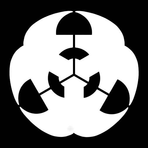 「三ツ大」紋（染抜）。